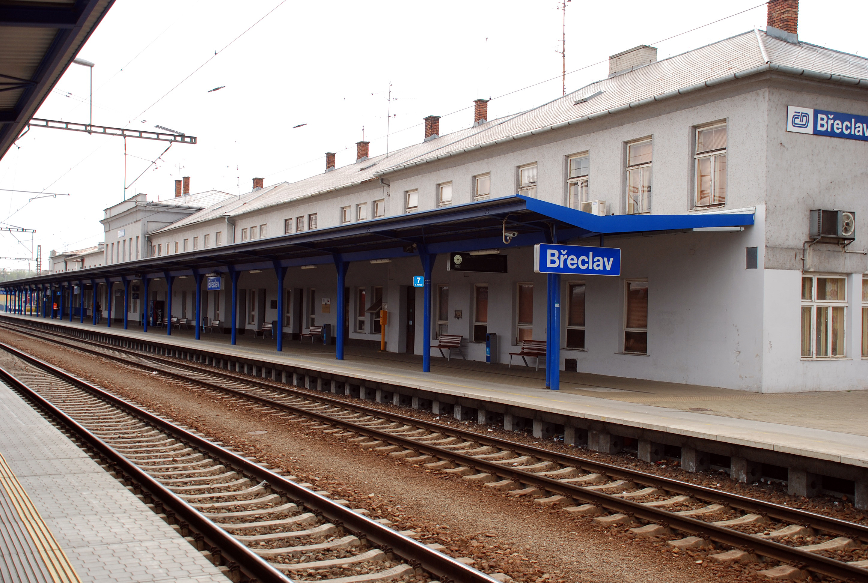 Bahnhof Břeclav, Tschechien